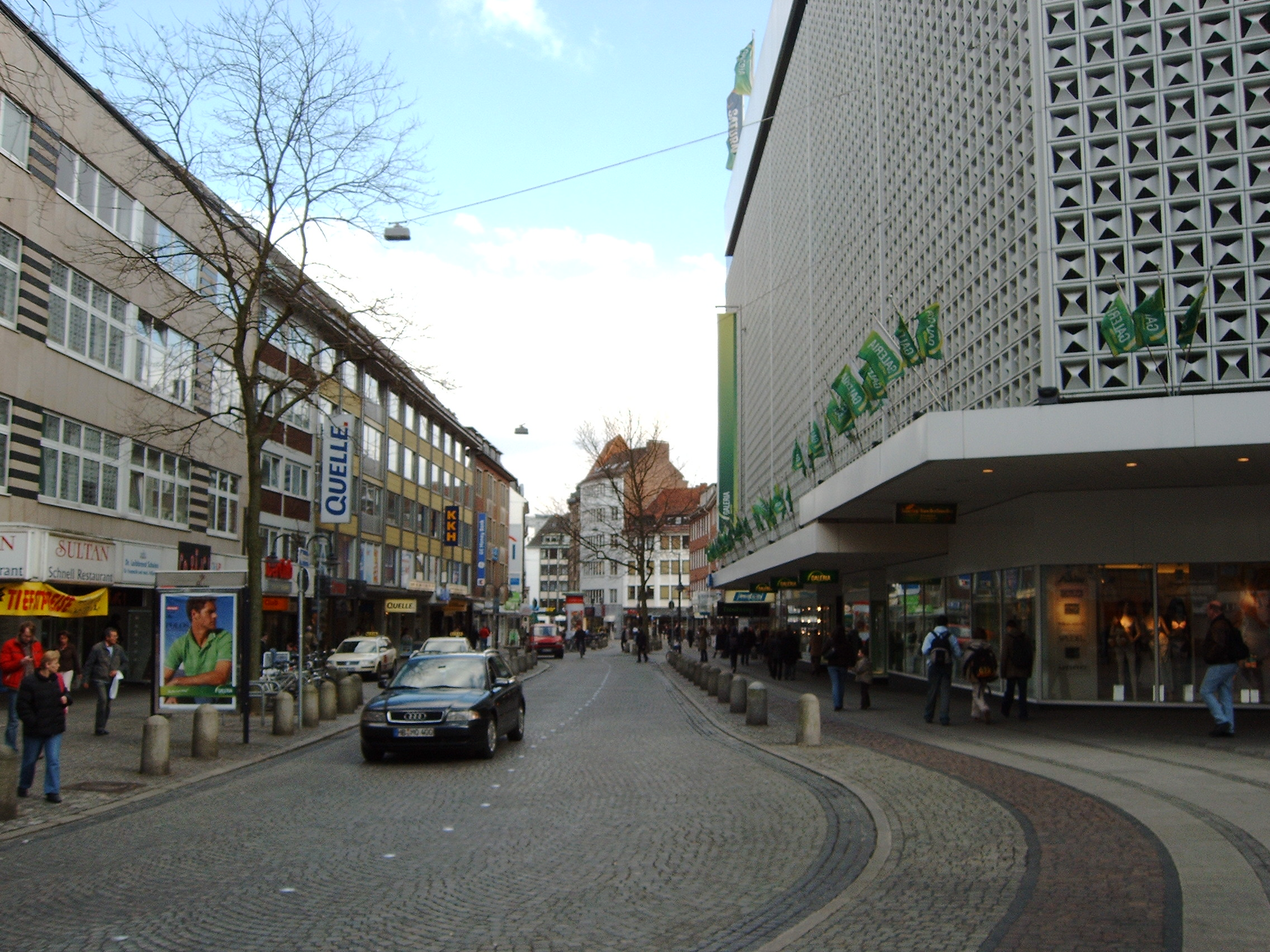 Knochenhauerstraße Bremen, Germany Down town